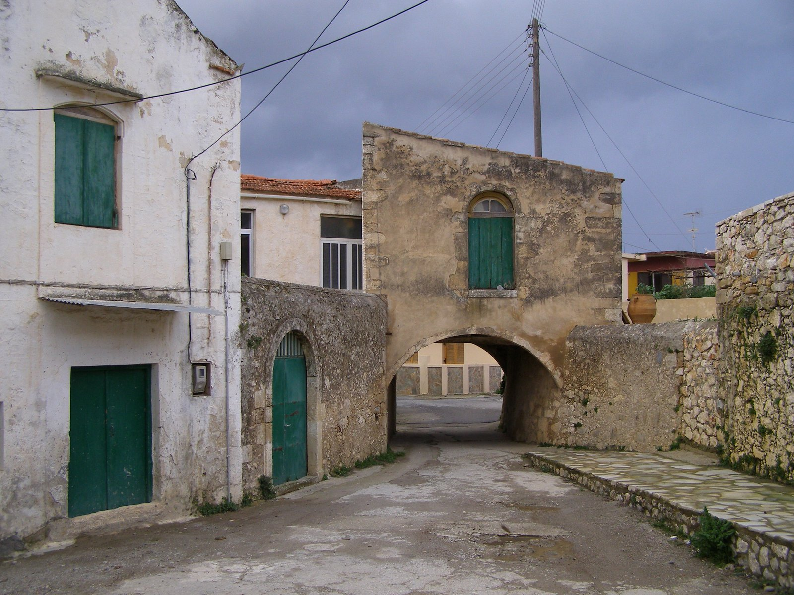 Prägnantes Haus in Armeni, Kreta